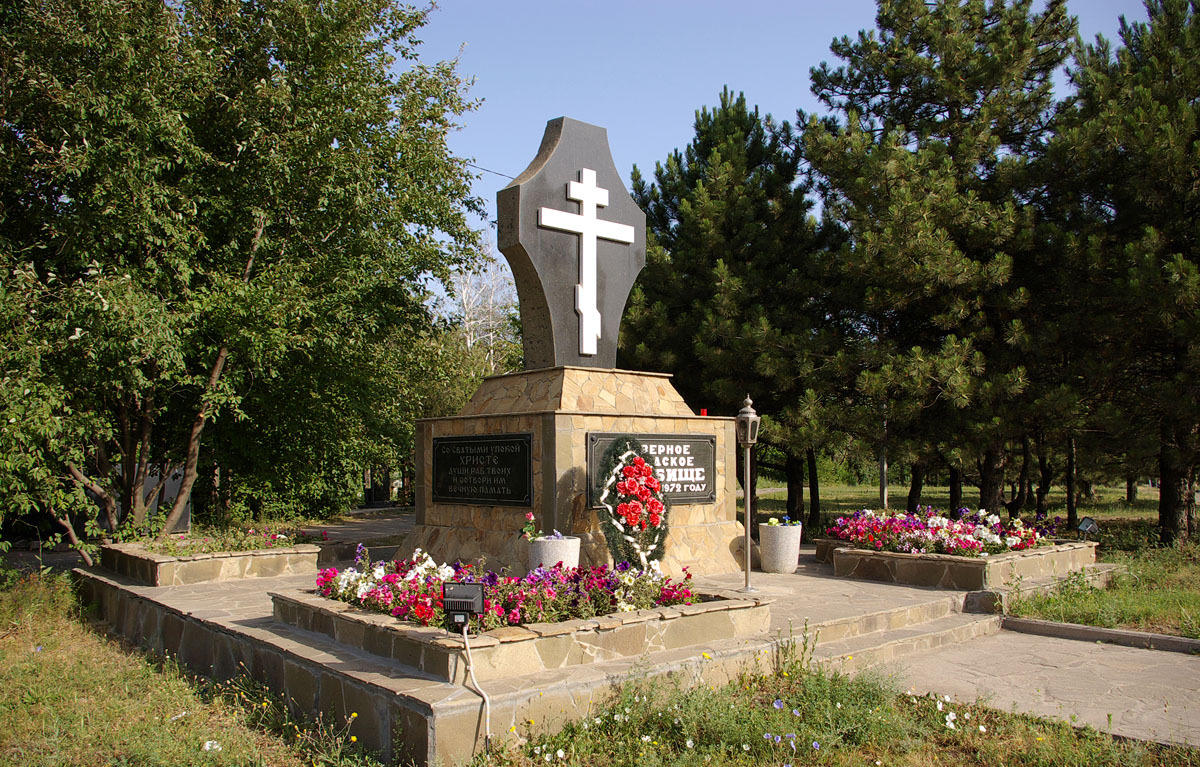 Памятный знак около Северного кладбища Ростова-на-Дону